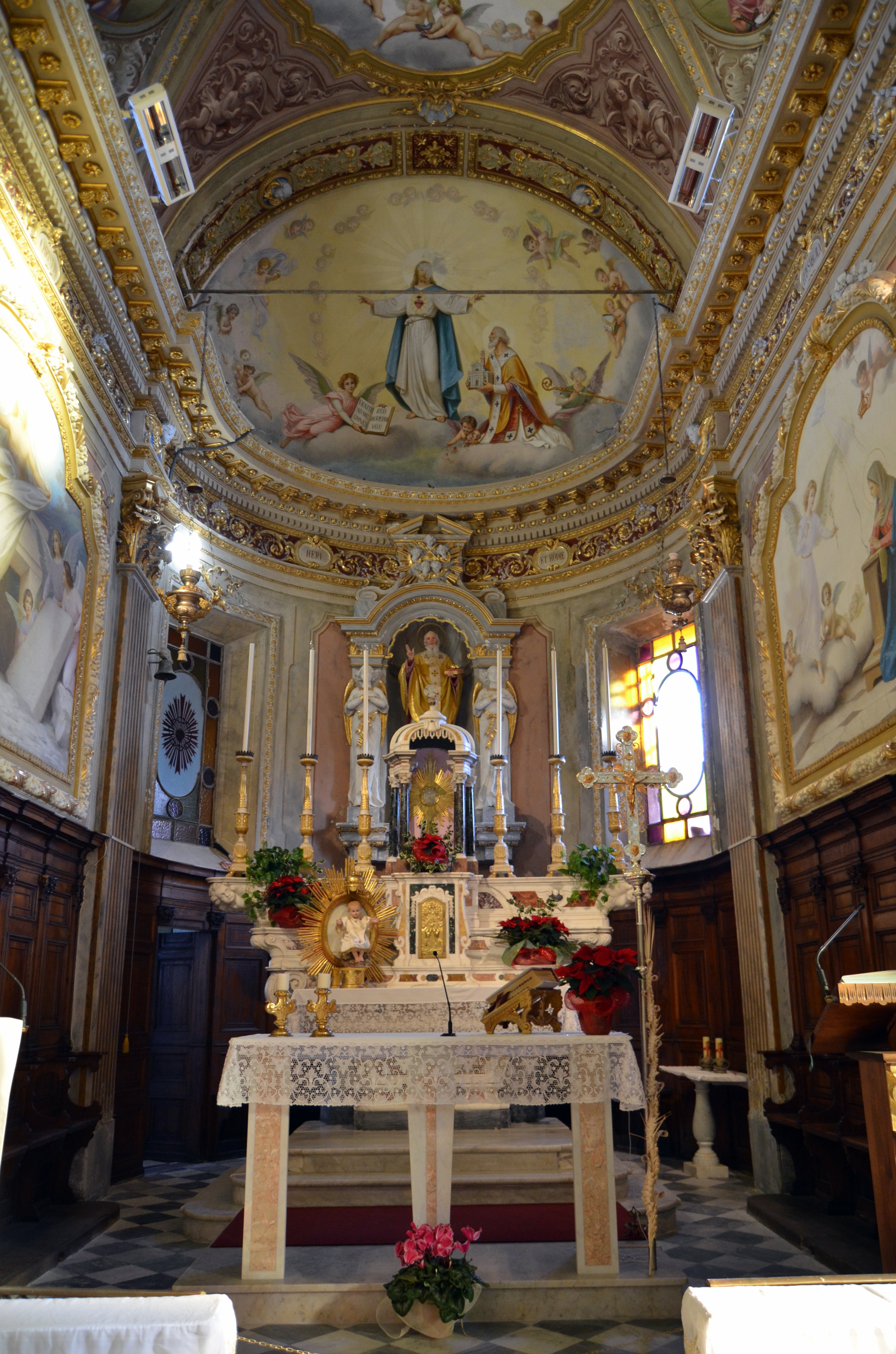 Altare maggiore della chiesa di San Nicolò, Coreglia Ligure, Liguria, Italia